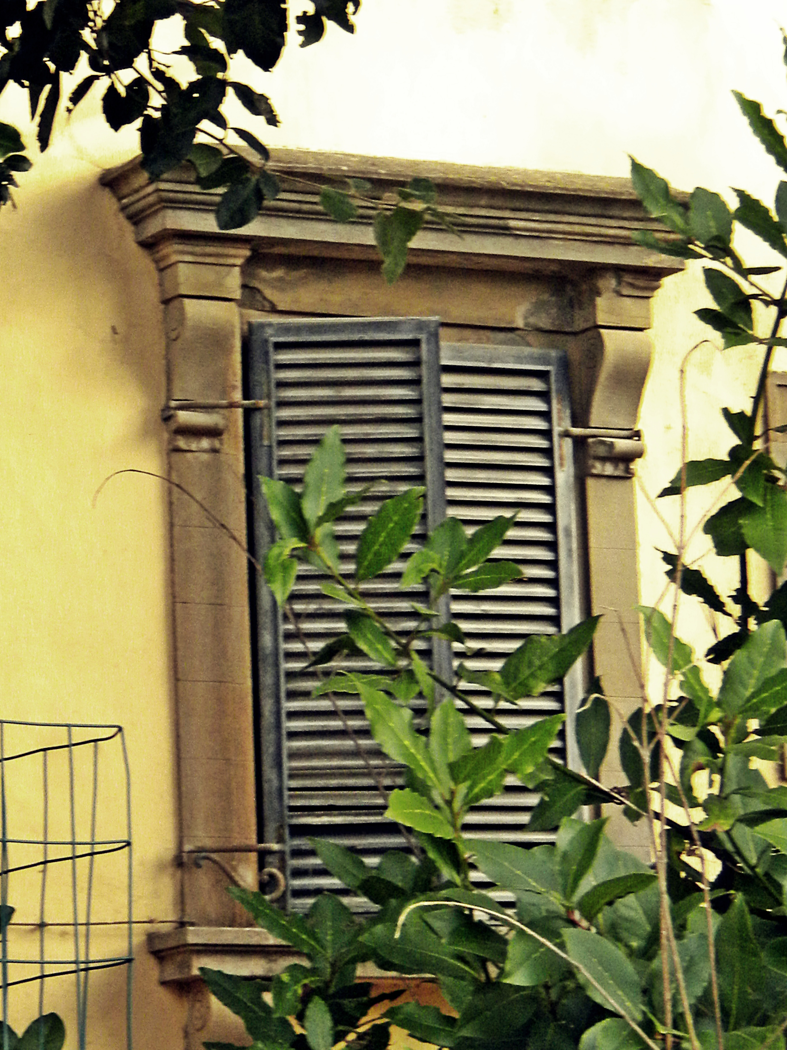 Villa Olmi